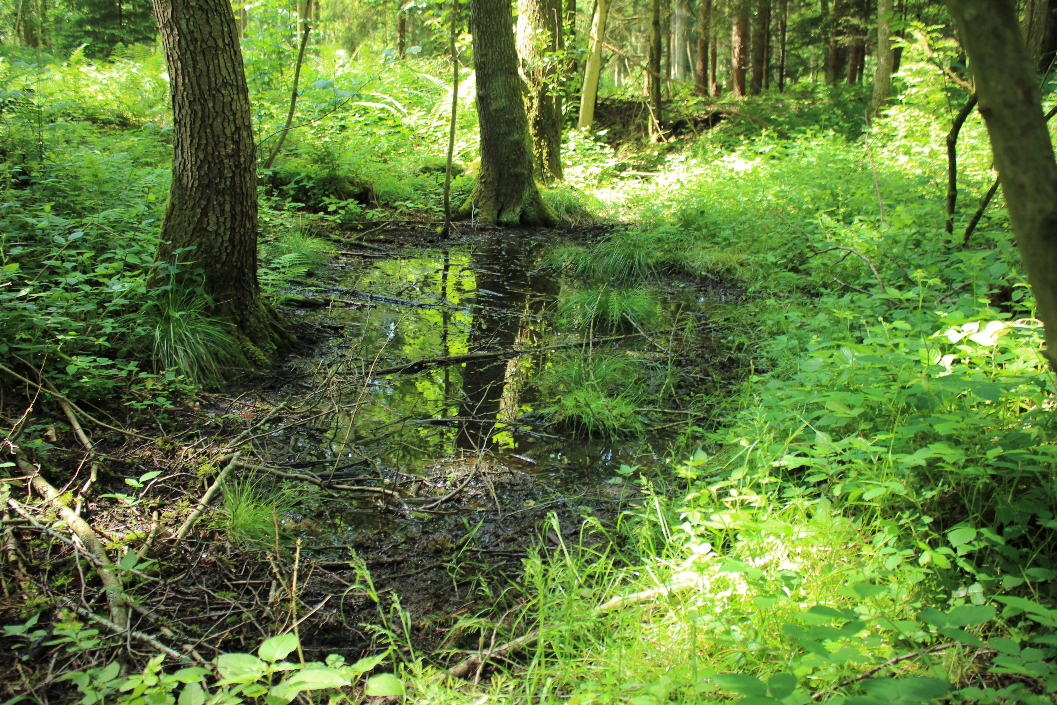 Die Gelbbauchunken-Habitate bei Ascholtshausen an der westlichen Grenze des Landkreises Straubing-Bogen umfassen ca. 16 Hektar. Das FFH-Gebiet umfasst drei getrennte kleinere Waldflächen beiderseits der Bahnlinie Landshut-Regensburg. Neben der geschützten Gelbbauchunke kommt dort auch die Frauenschuh-Orchidee vor. Das FFH-Gebiet ist Teil des europäischen-ökologischen Netzes "Natura 2000".